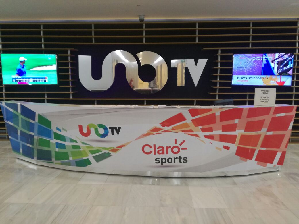 Fotografía de la recepción de Uno TV en las instalaciones de Plaza Carso, Ciudad de México.